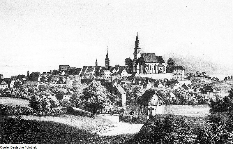 Original image description from the Deutsche Fotothek Kamenz. Stadtansicht, aus: Saxonia 1837